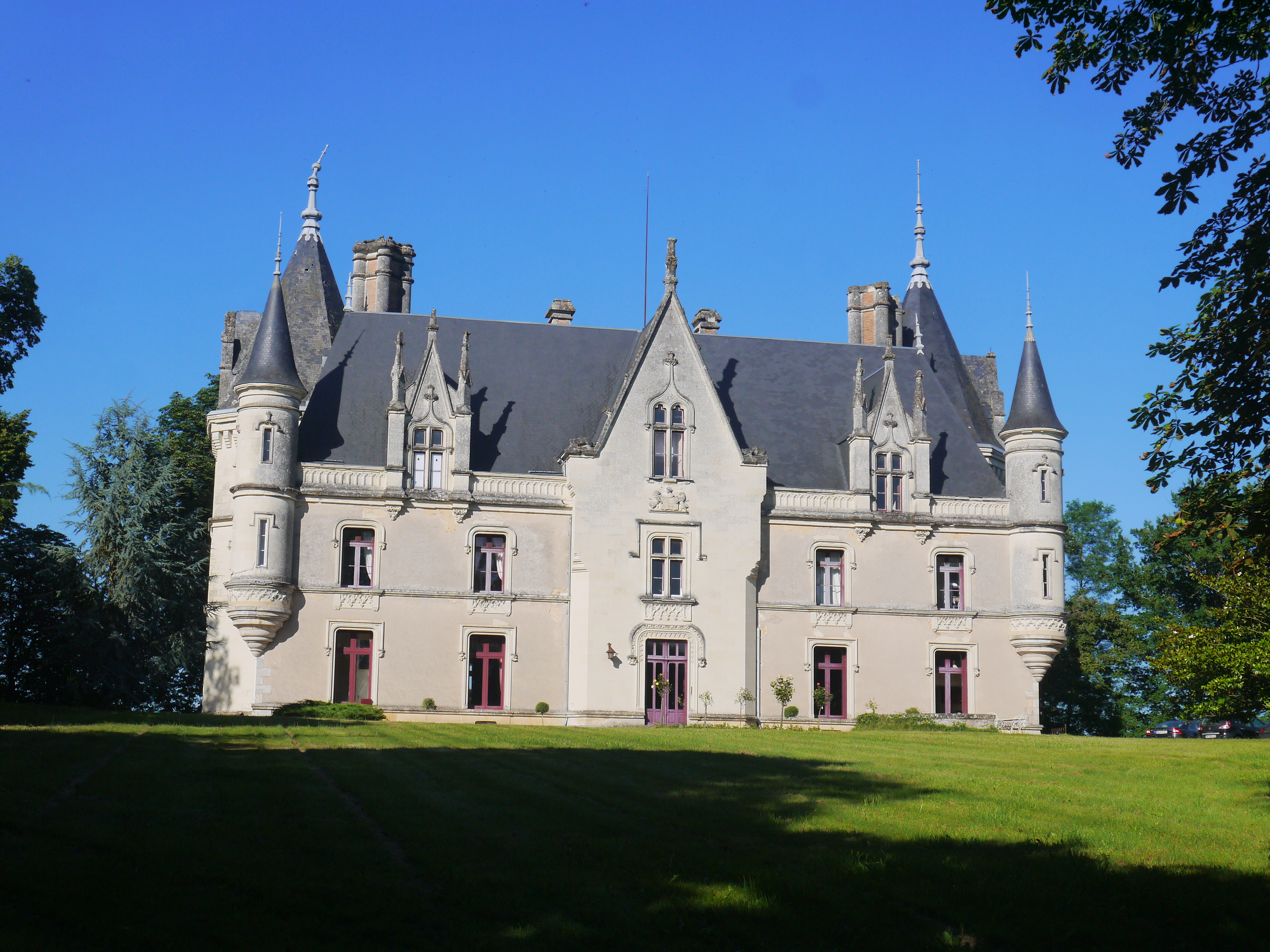 Le château de Montreuil en 2016.